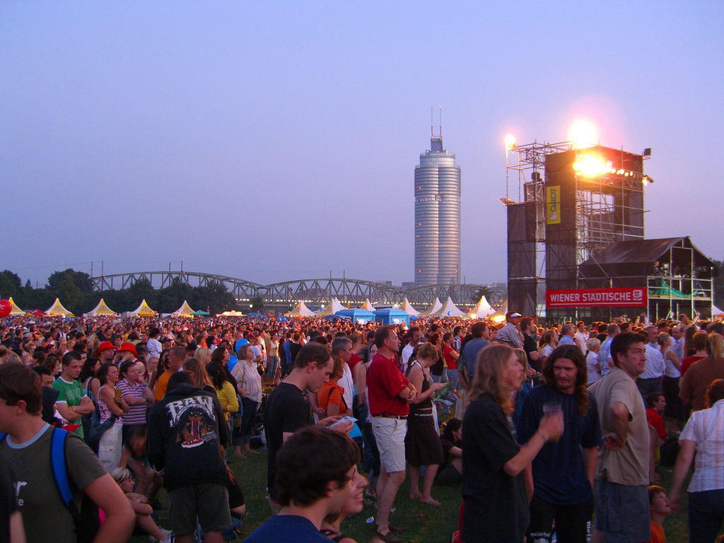 Donauinselfest 2006